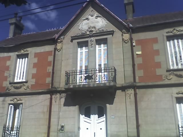 Masión inglesa de 1911 en Merlo, Provincia de Buenos Aires.